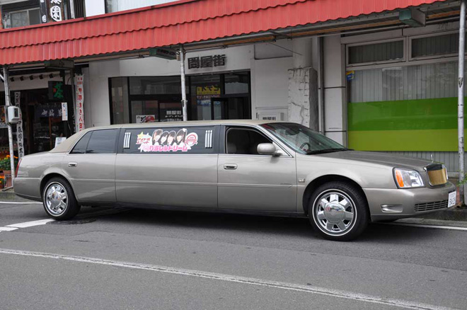 パラレルドリーム（移動用リムジン／長野県伊那市にて）